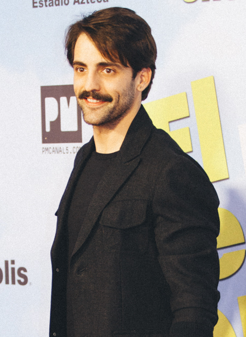 Antonio Gahona en premier